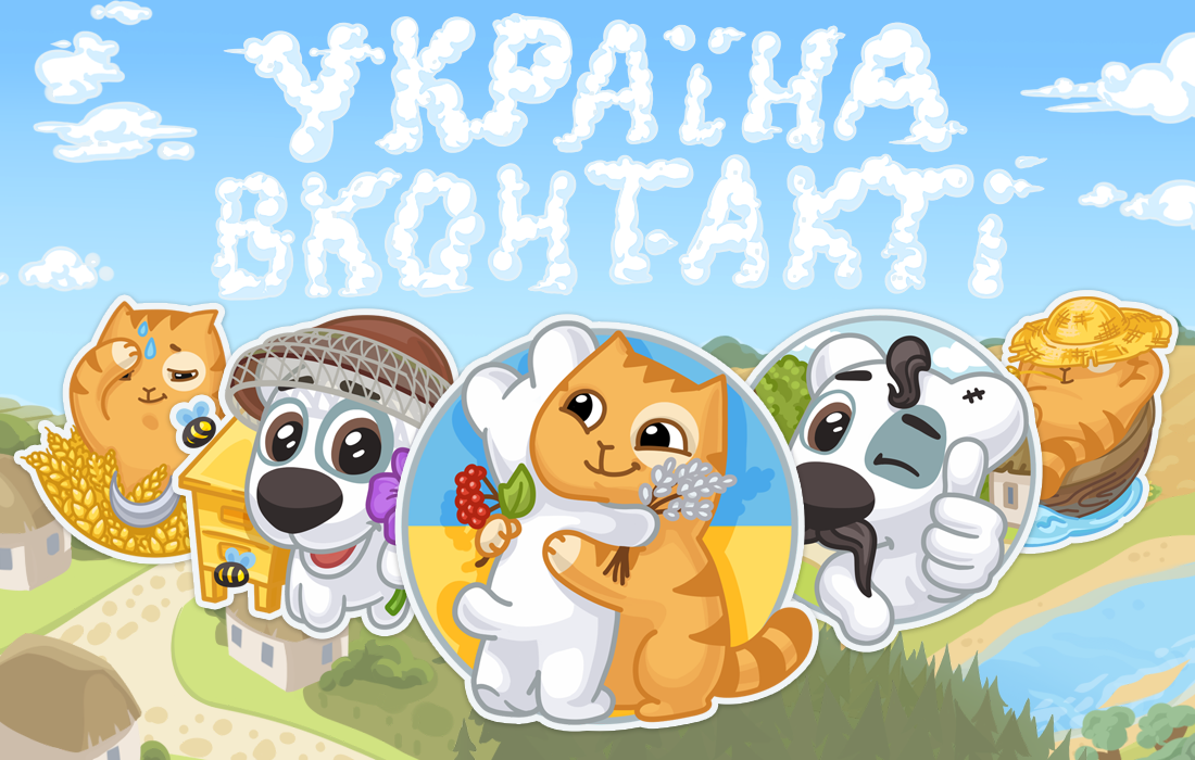 Набір стікерів «Україна ВКонтакті»